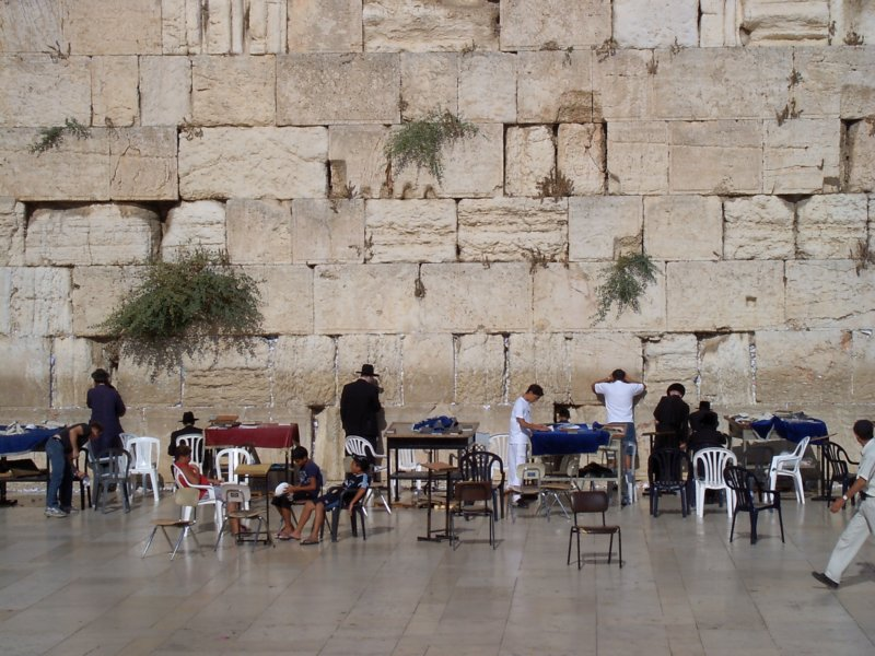 Jerusalem - The Western Wall